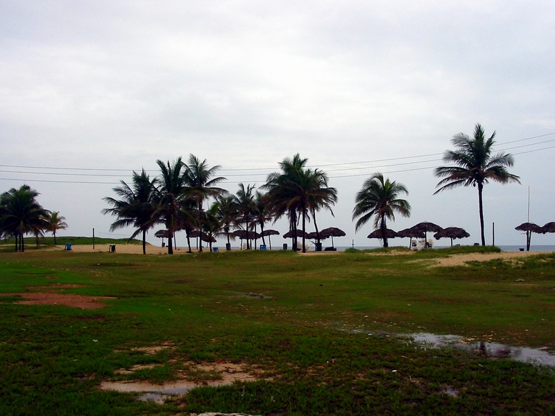 Tarara, Cuba